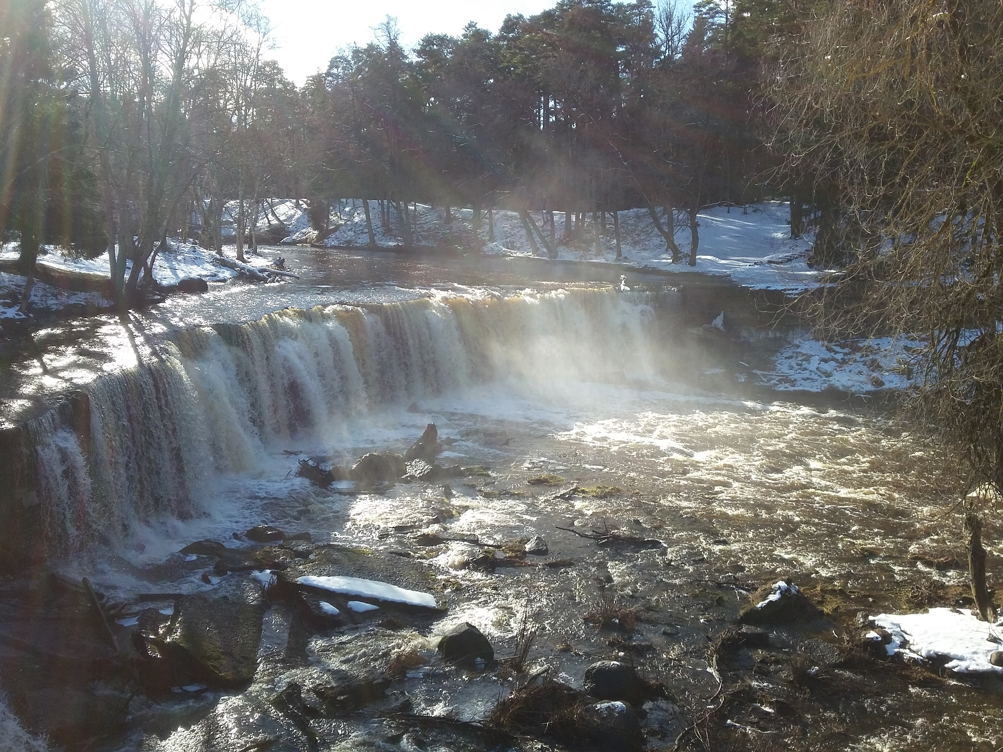 Ujëvara e Lumit Keila, me një lartësi prej 6 m.